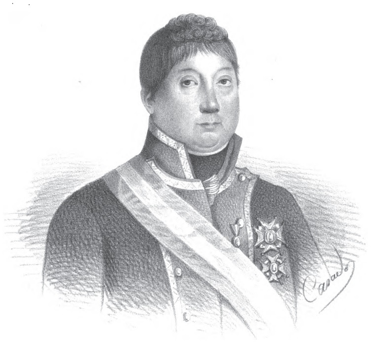 Vicente María de Cañas y Portocarrero, duque del Parque, grabado de Rufino Casado